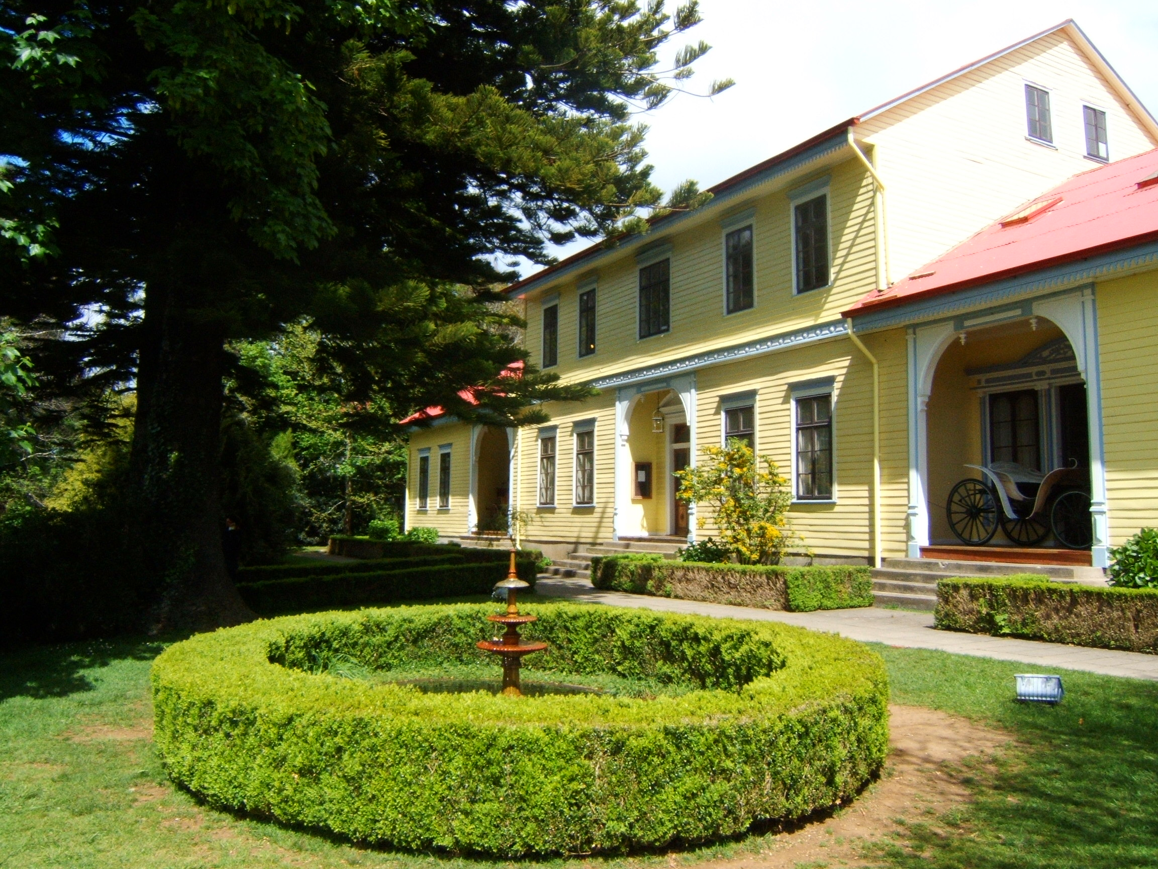 Patio de la Casa Anwandter This is a photo of a national monument in Chile: 167